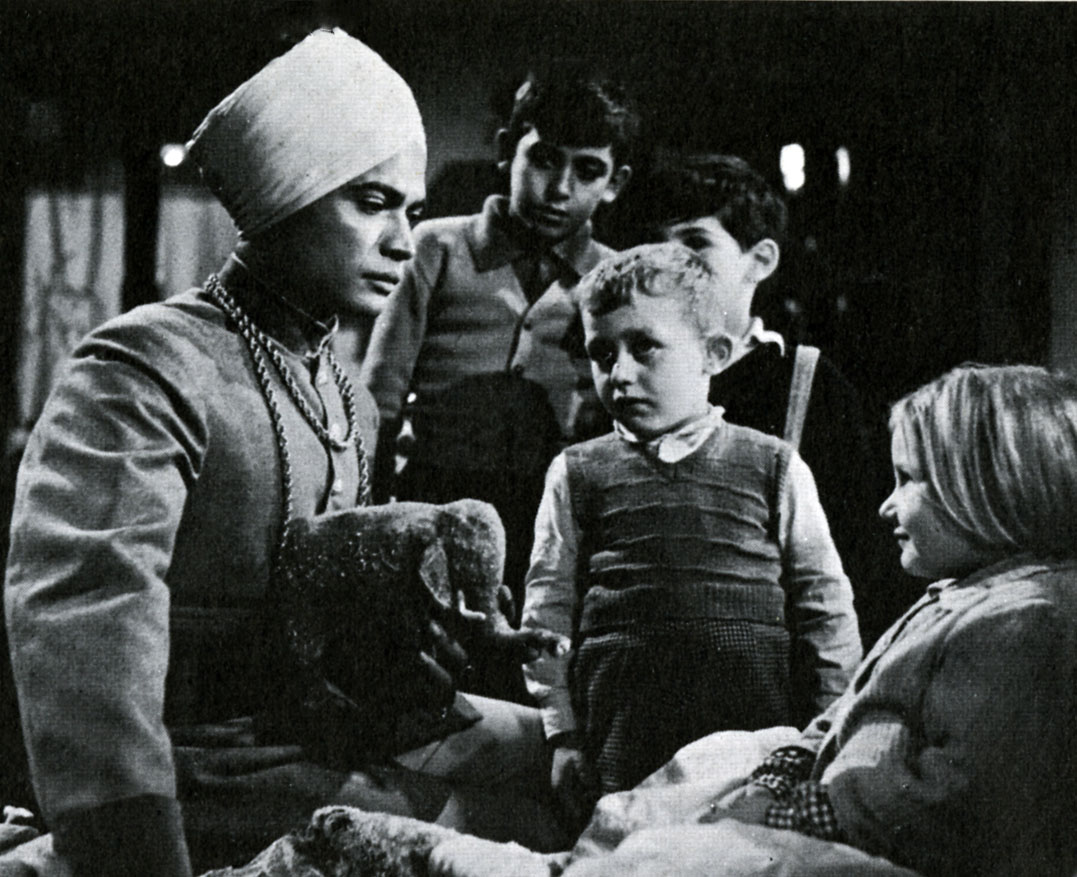 Sabù in Buongiorno elefante